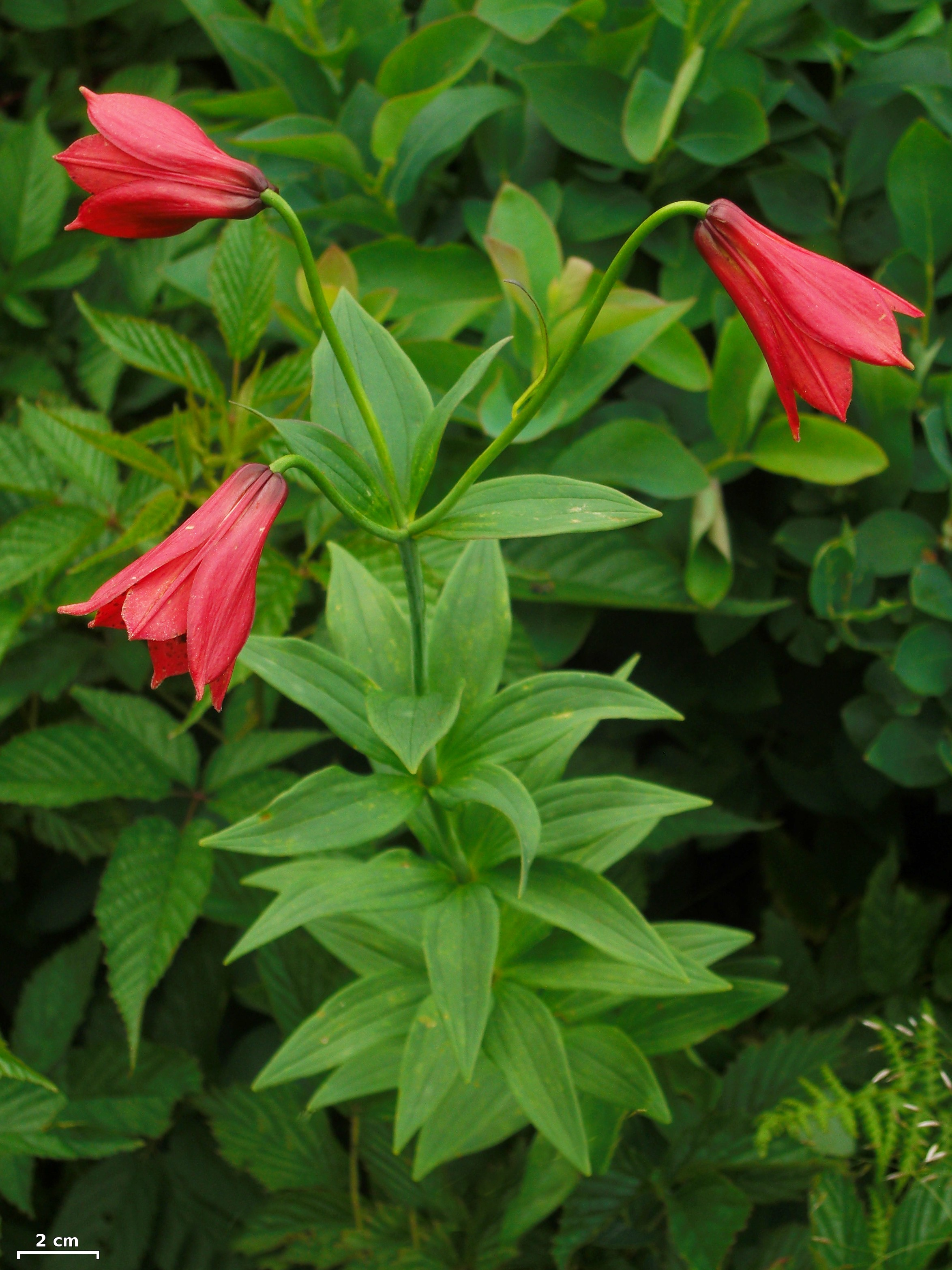 Lilium grayi Jane Bald, Tennessee border, 20110622